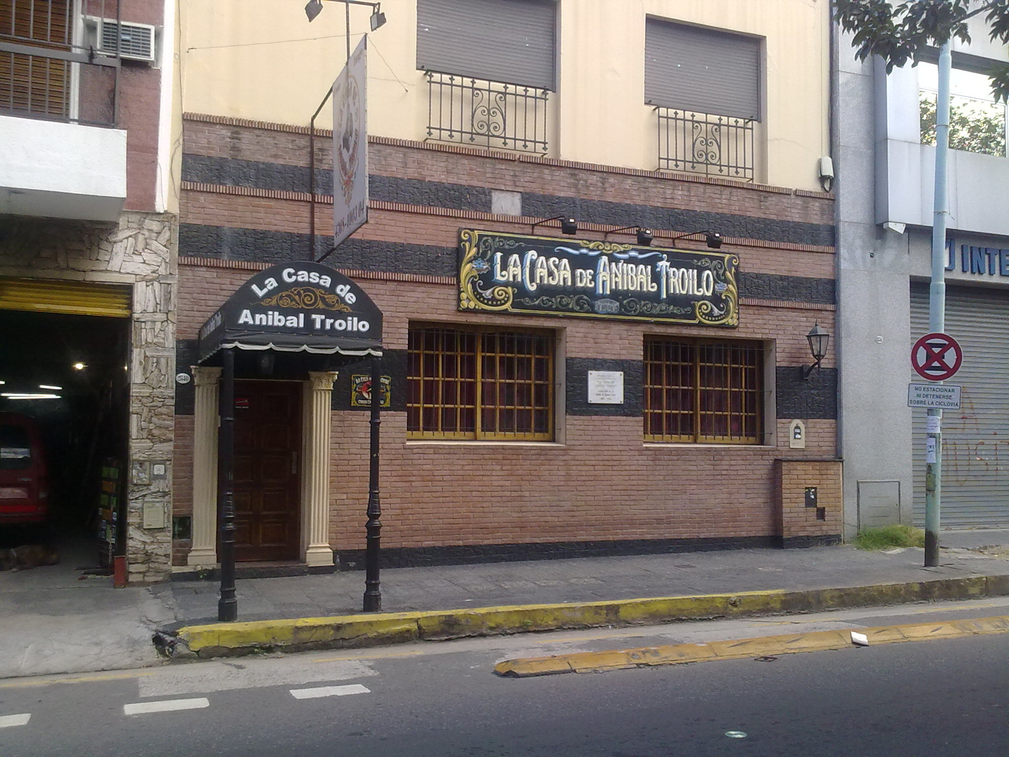 Restaurante - Cena - Show, la casa de Anibal Troilo, Carlos Calvo 2540, Buenos Aires, Argentina.